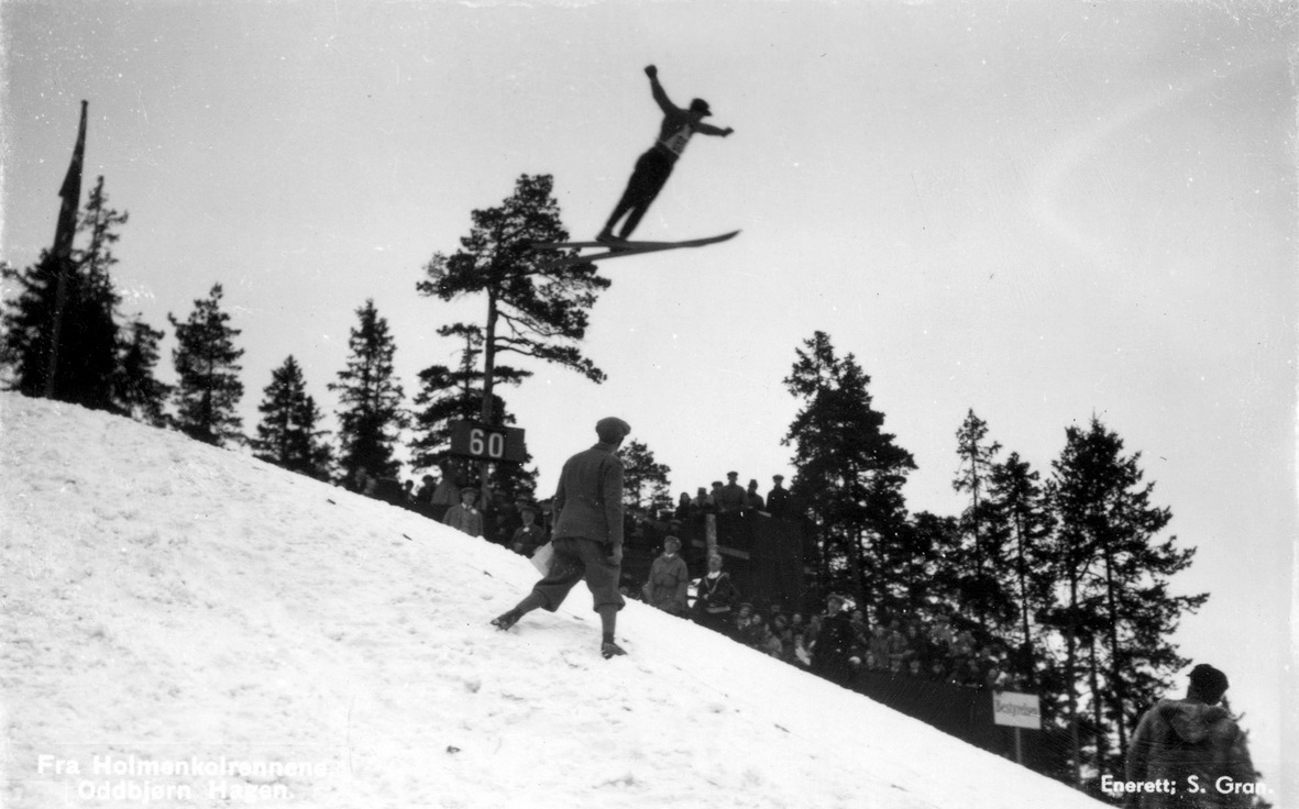 le skieur norvégien Oddbjørn Hagen à Holmenkollen